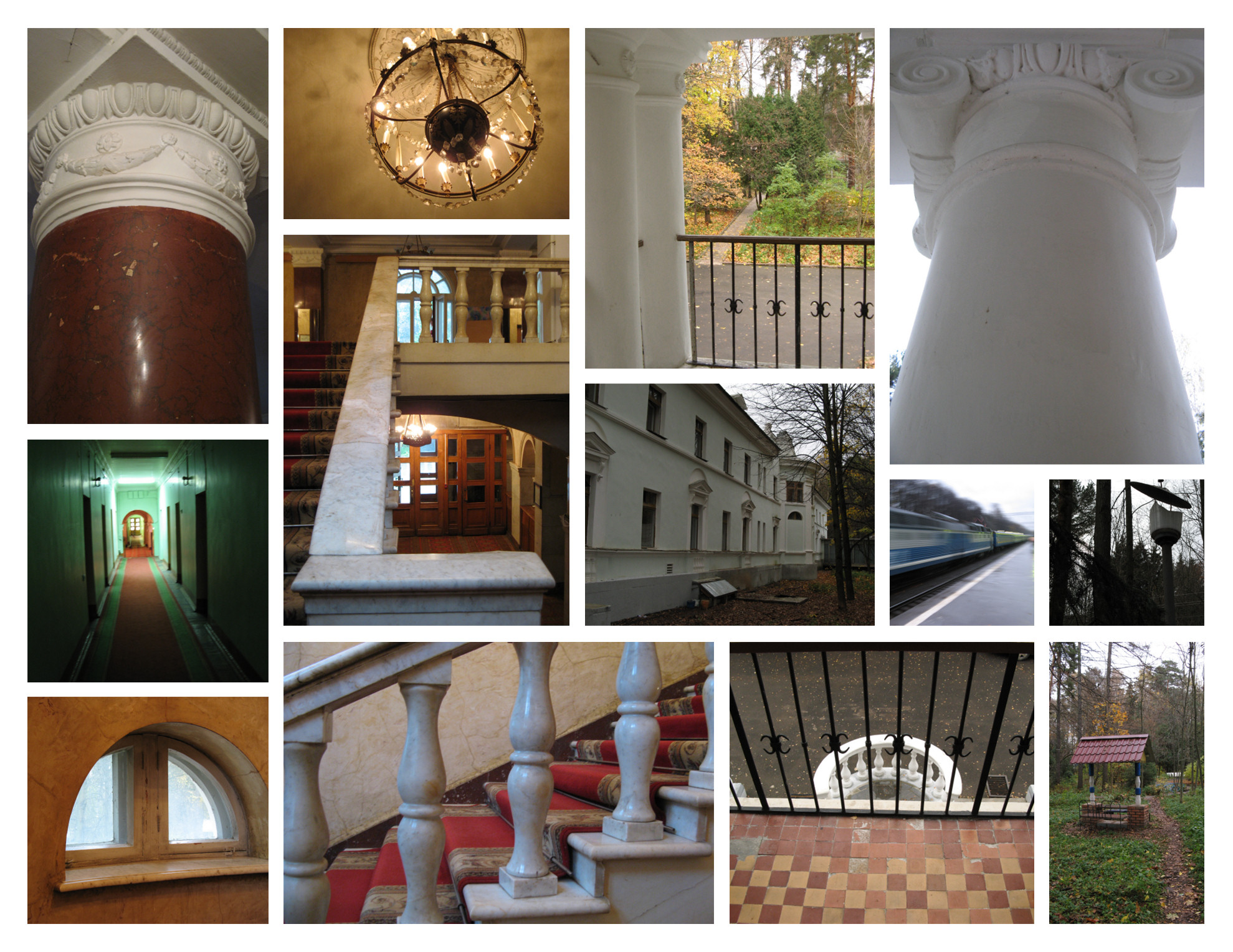 Переделкино-сюжеты. 2011 г.